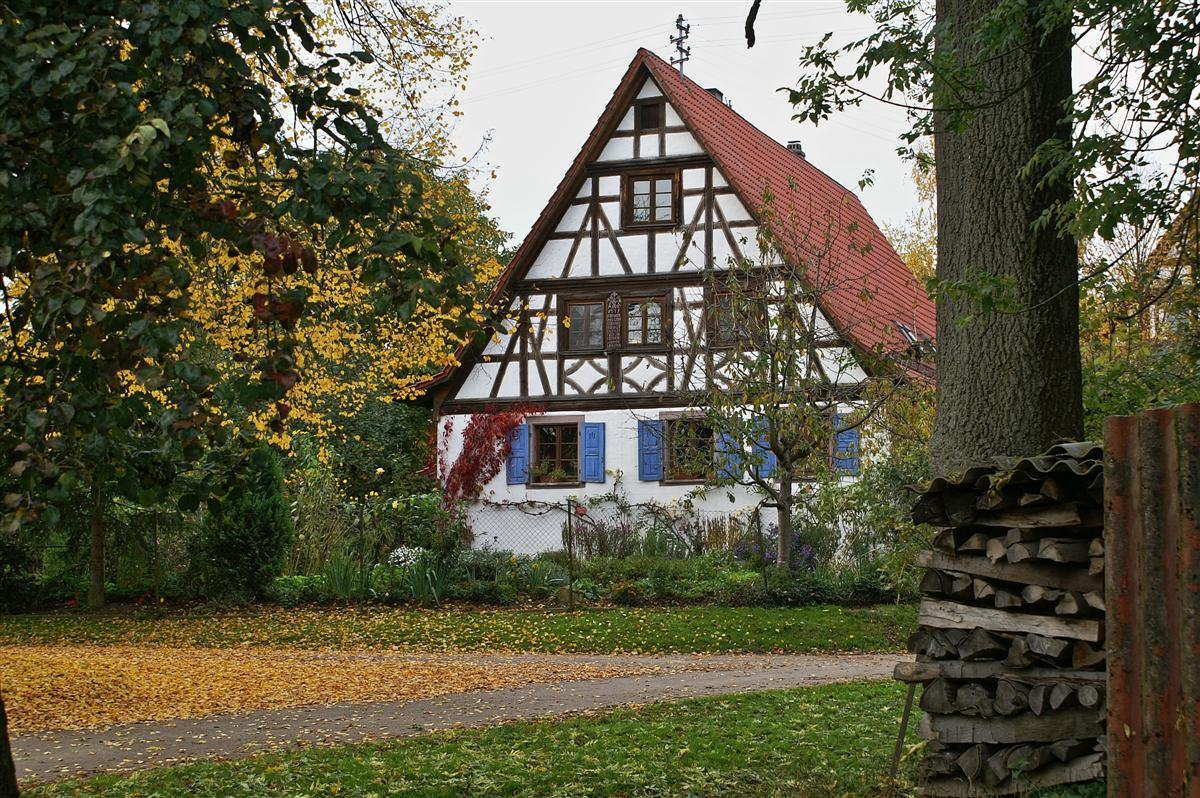 Königsbach, Traishof - Fachwerkhaus 1